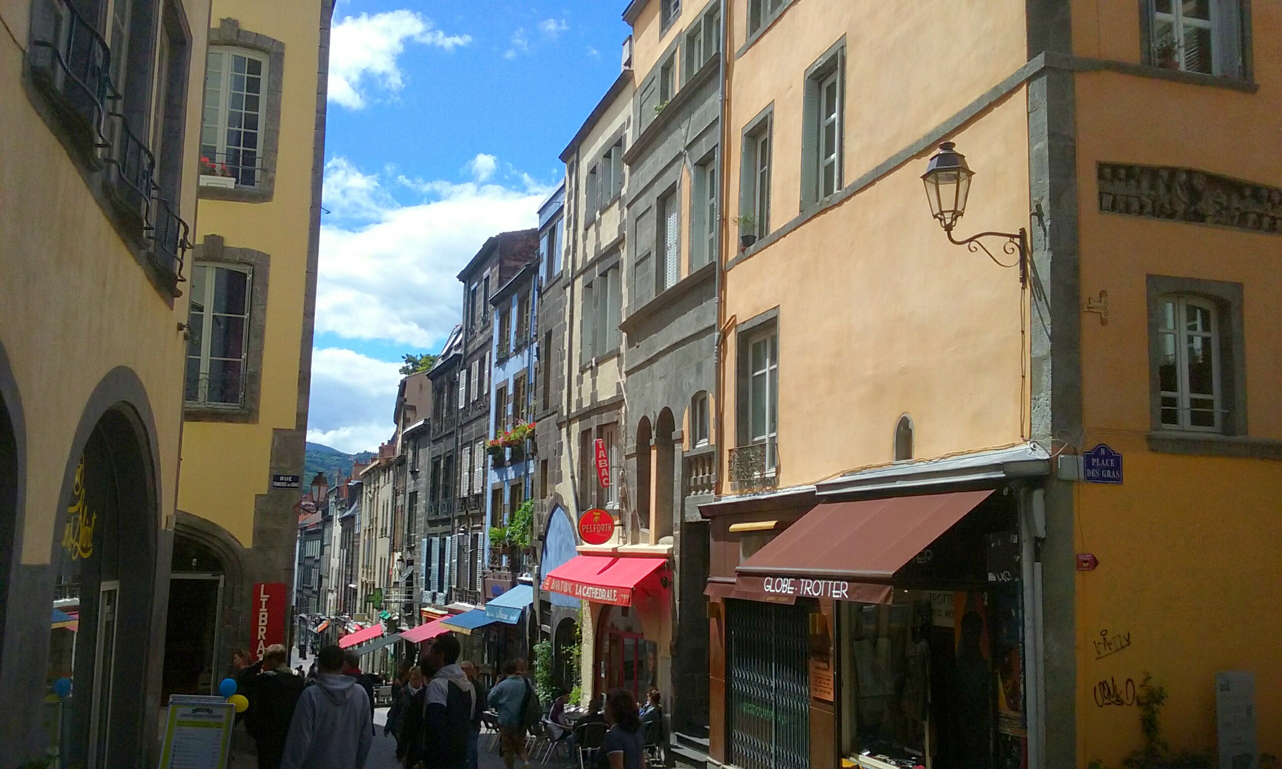 Rue des Gras, Clermont-Ferrand, Auvergne.